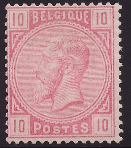 Timbre de Belgique à l'effigie de Léopold II, 10 c rose, émis en 1883. N°38 dans le Catalogue officiel de timbres-poste (COB).